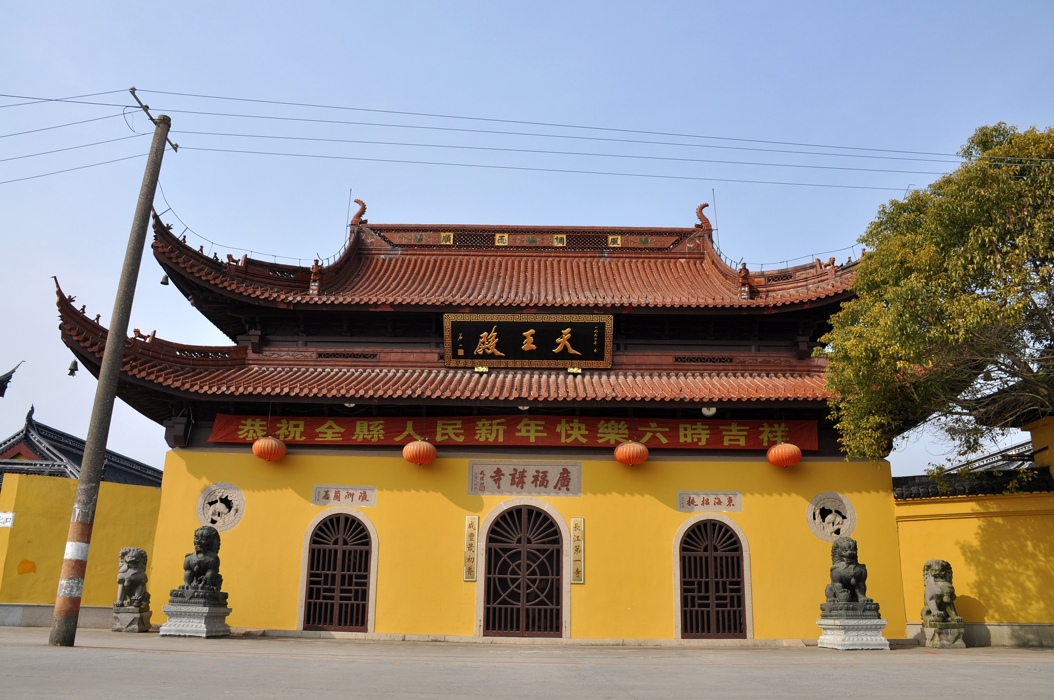 广福讲寺 中兴镇陈彷公路3099弄100号